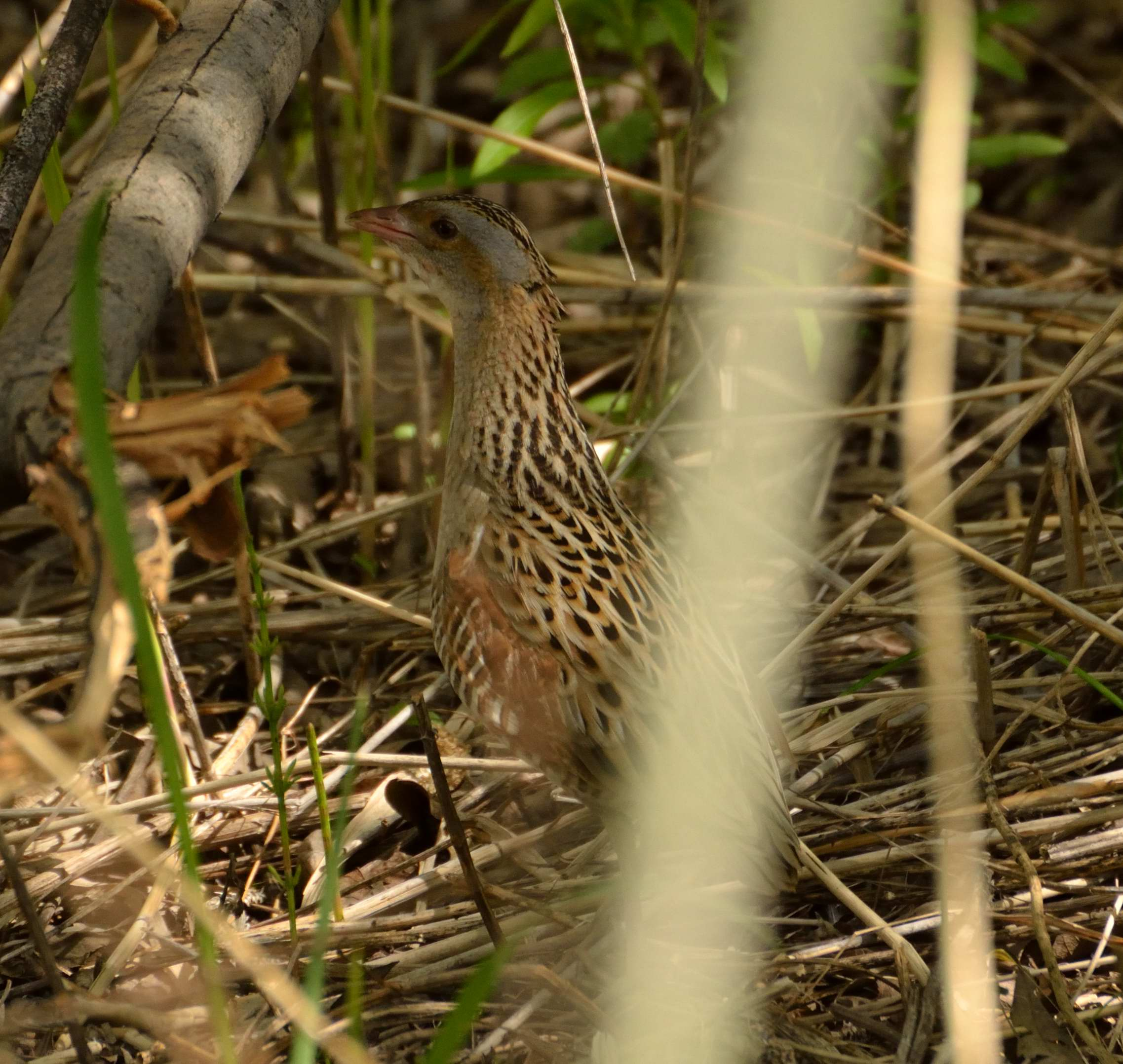 Коростель в Бердске